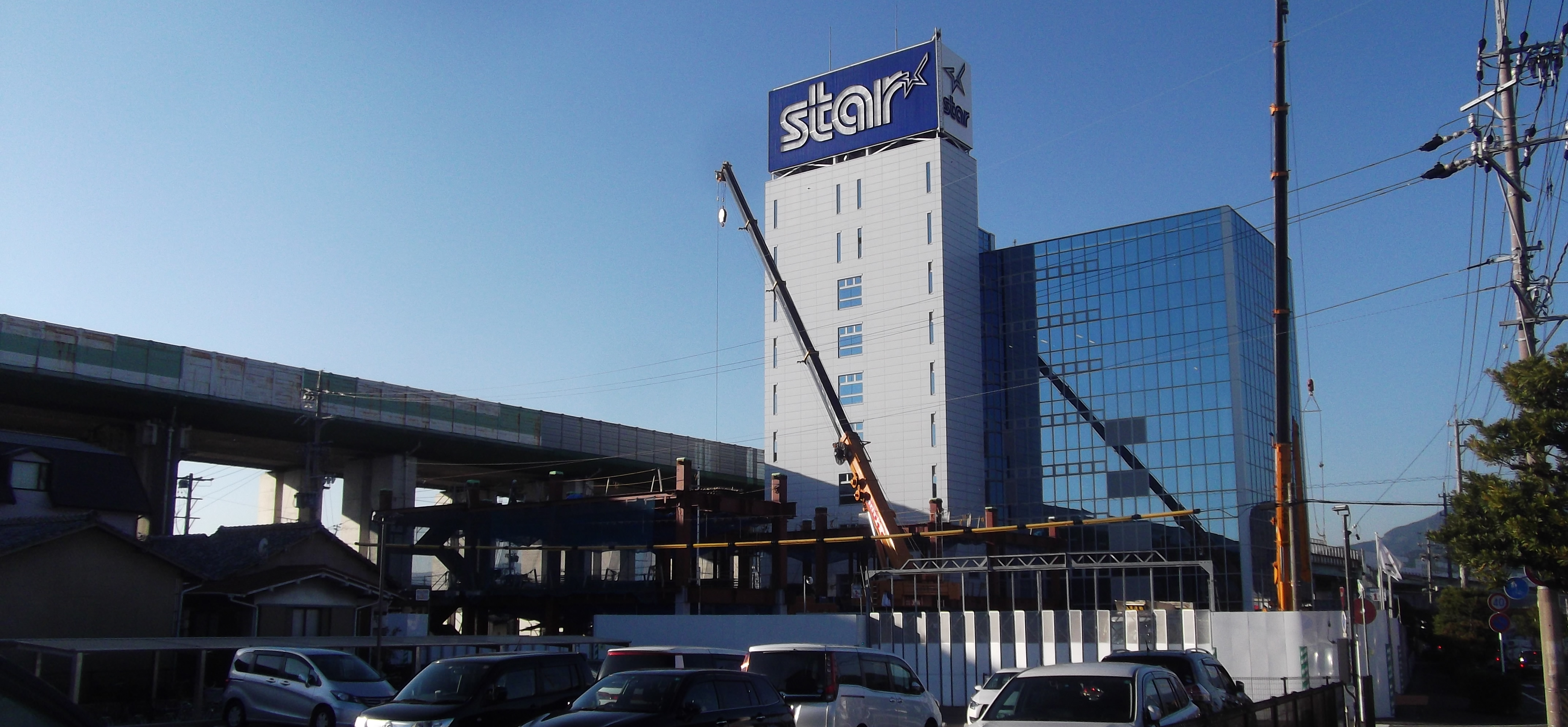 スター精密本社ビル。隣の高速道路は東名高速道路。